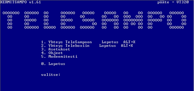 Telesampo sovelluksen päävalikko